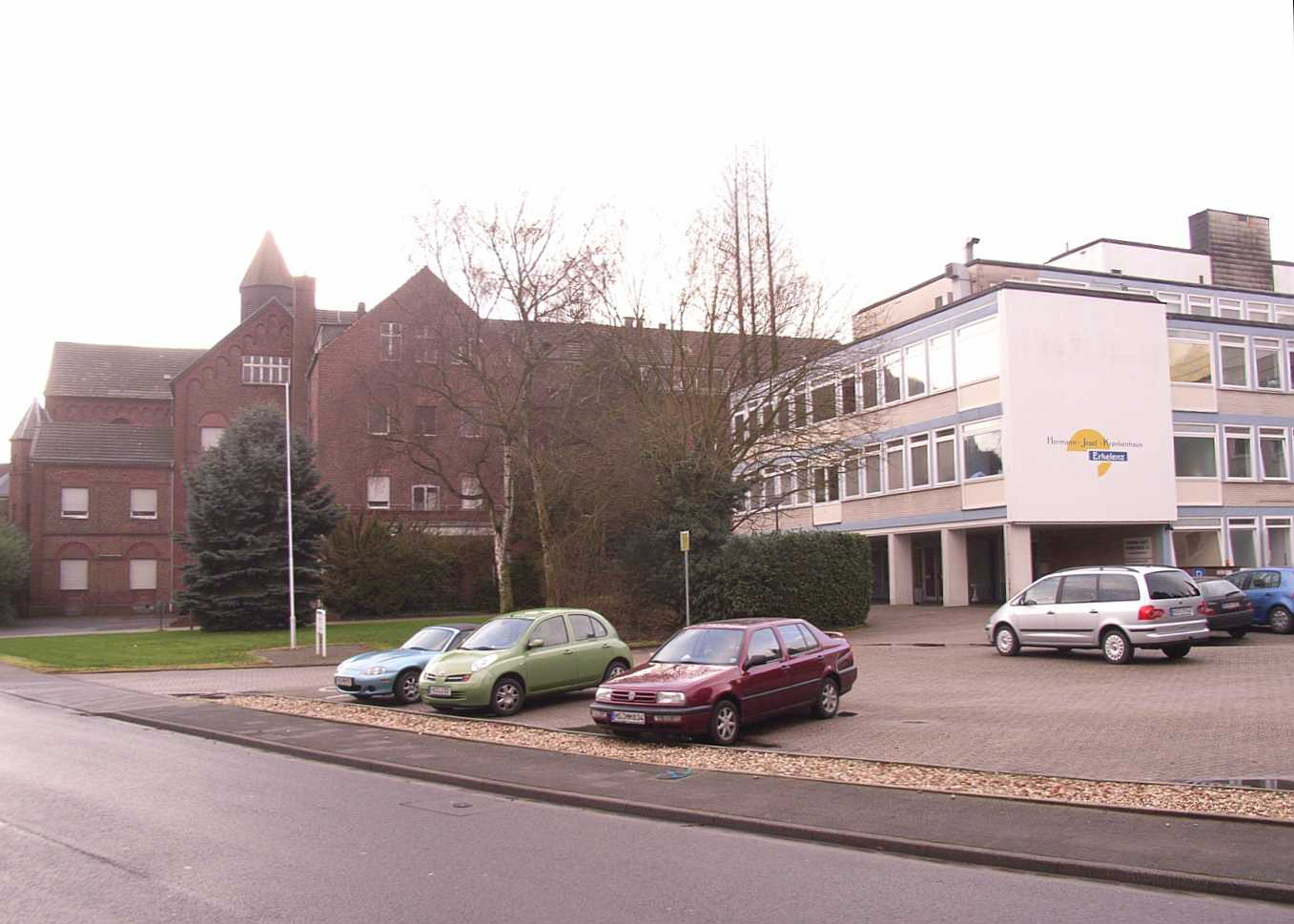 Haus Nazarteh, Erkelenz-Immerath, NRW